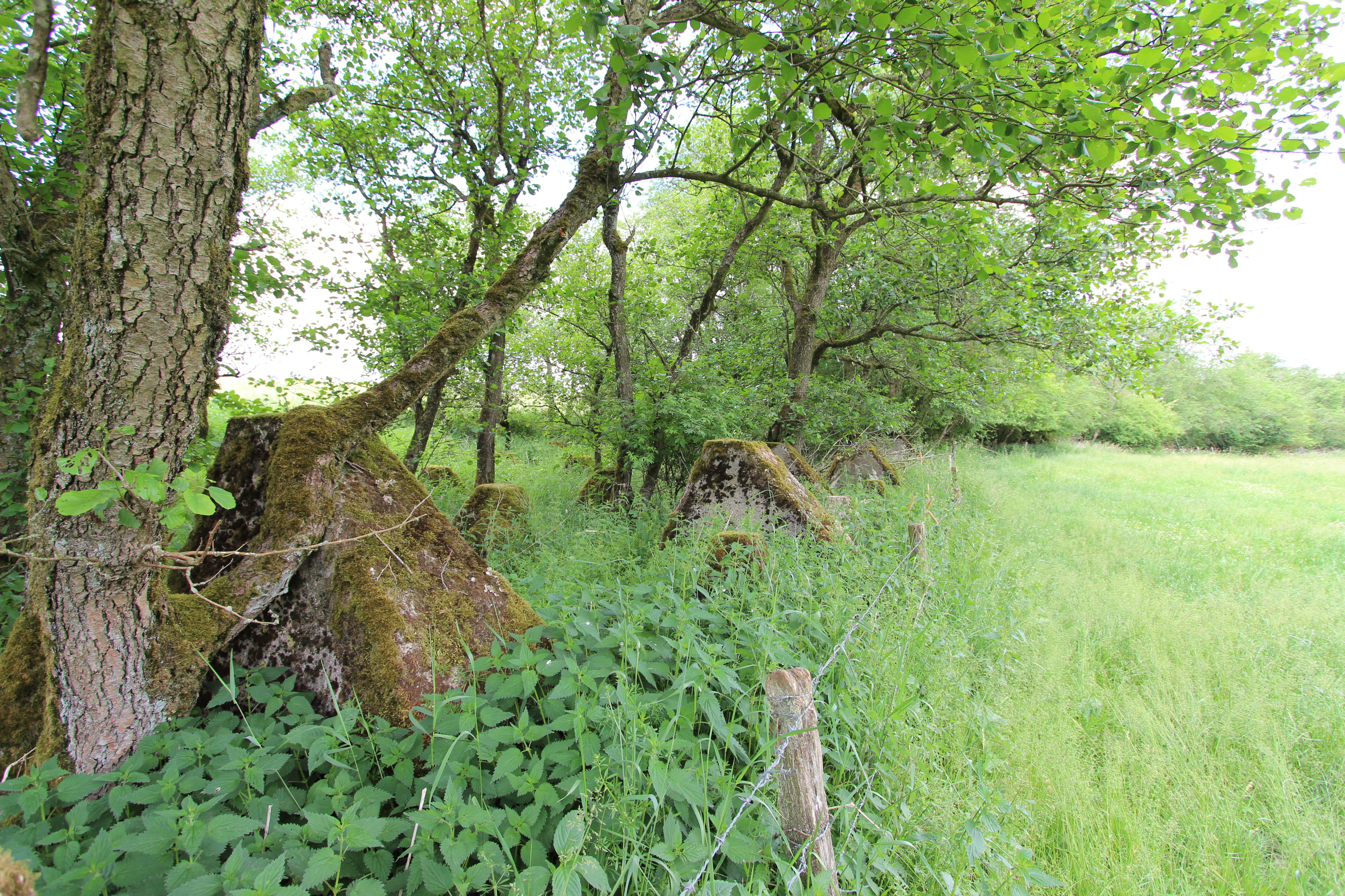 54611 Scheid, an der westlichen Grenze der Ortsgemeinde. Mehrere sehr gut erhaltene Abschnitte der Höckerlinie des Westwalls, 1939. Aufnahme von 2017.